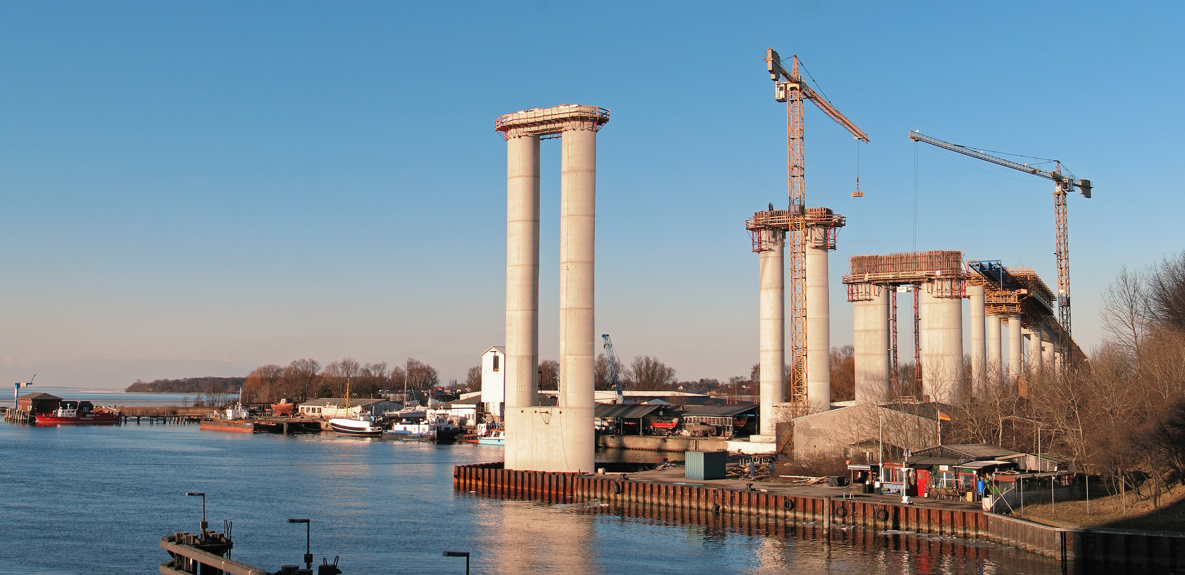 Description/Beschreibung: Bau der neuen Strelasundquerung auf dem Dänholm Author/Fotograf: Darkone, März 2006